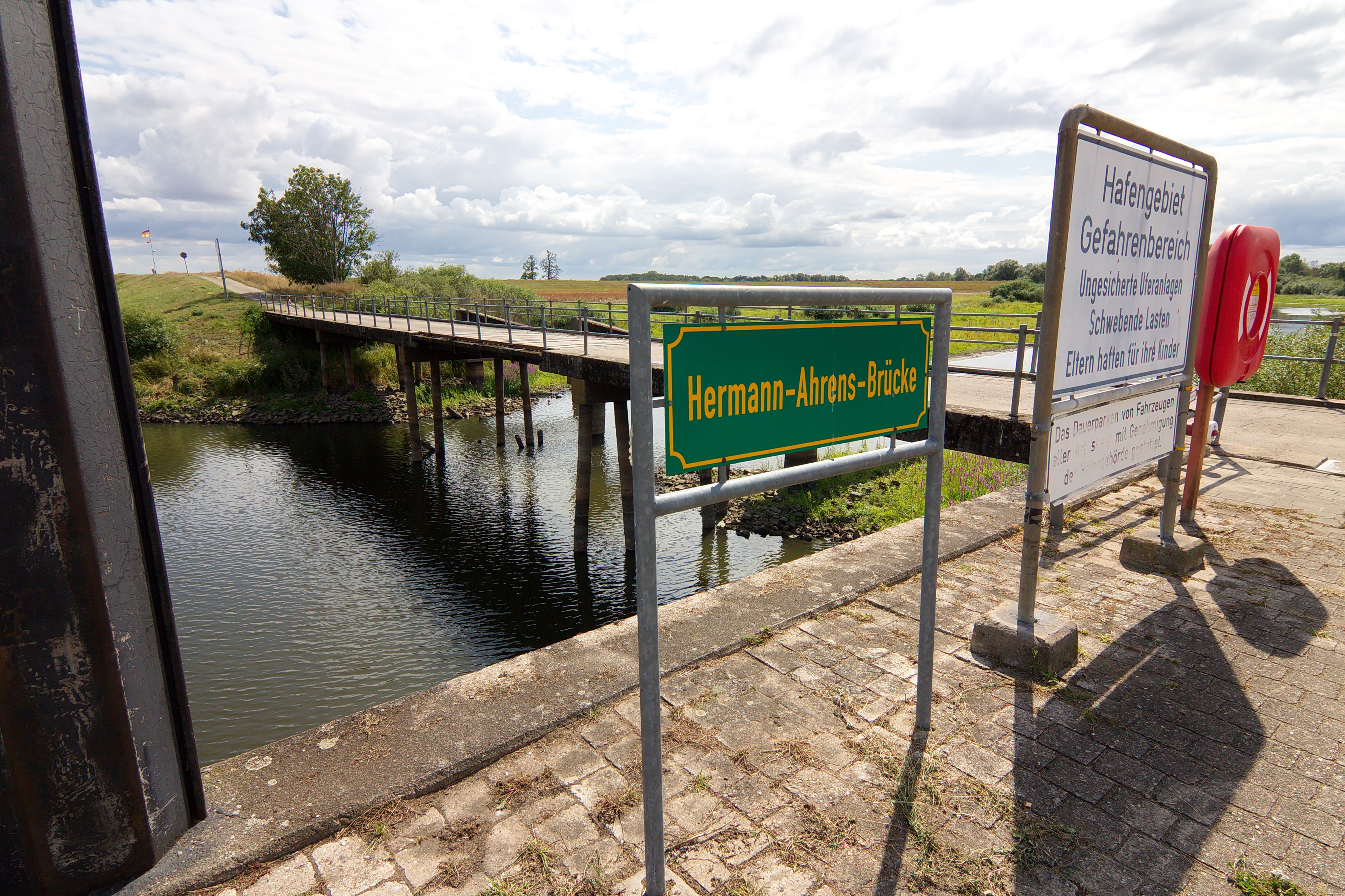 Herman-Ahrens-Brücke in Schnackenburg, Schnackenburg, Deutschland